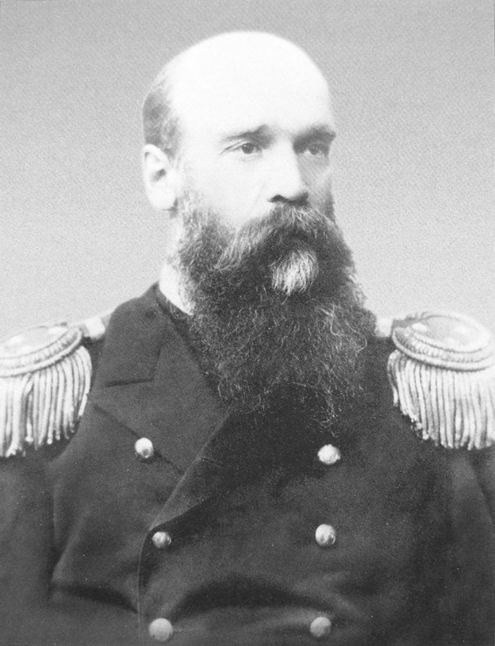 Пётр Ио́сифович Сере́бренников (22 июня 1853 — 14 мая 1905) — капитан 1-го ранга Российского императорского флота. Командир броненосца «Бородино», на котором и погиб в Цусимском сражении.